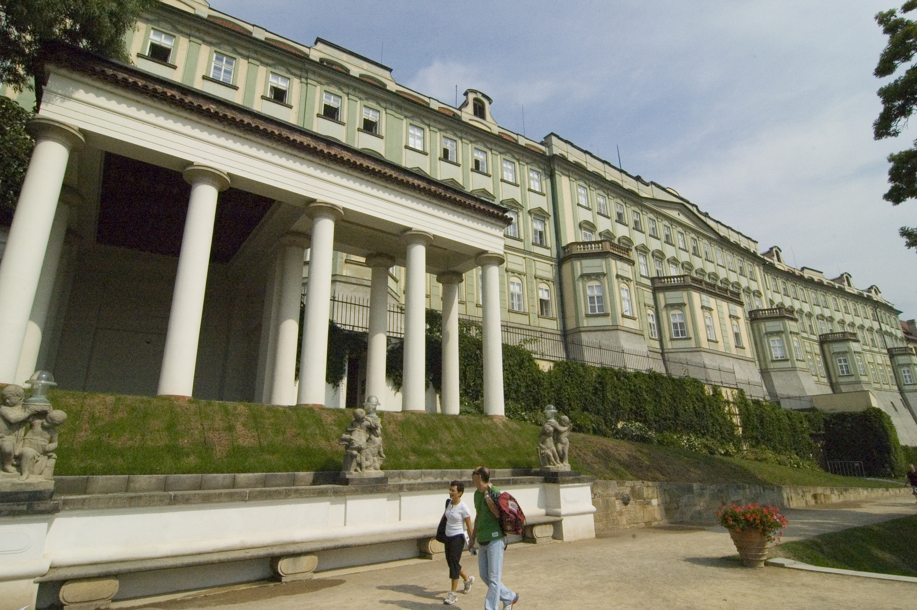 Pražský hrad, Ústav šlechtičen, pohled ze zahrady Na Valech